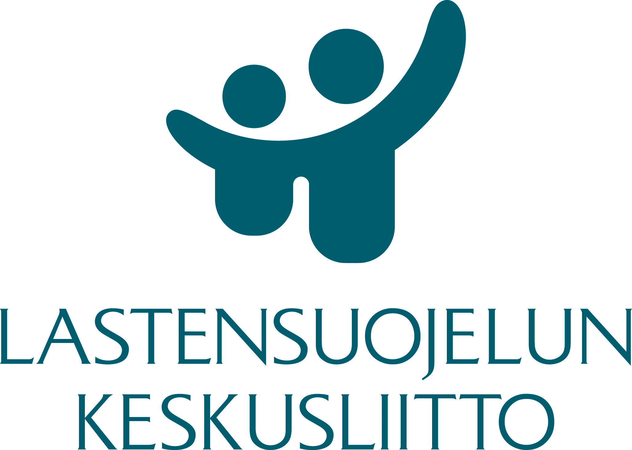 Lastensuojelun Keskusliiton logo